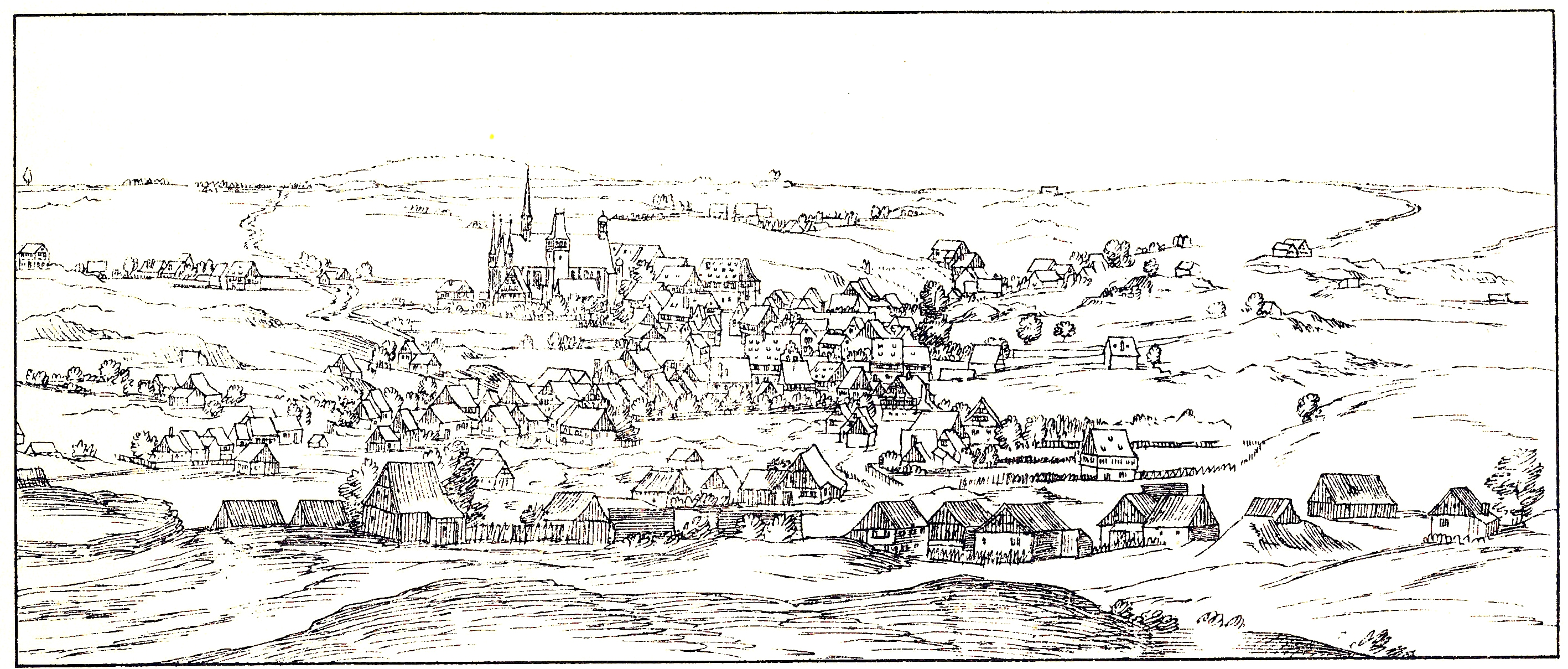 Dilichstich von Neustädtel (Schneeberg)